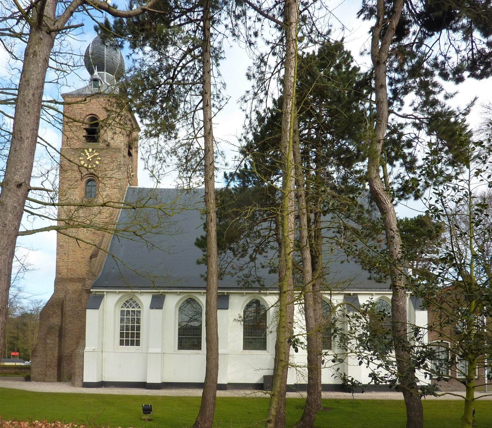 Dorpskerk Oostvoorne